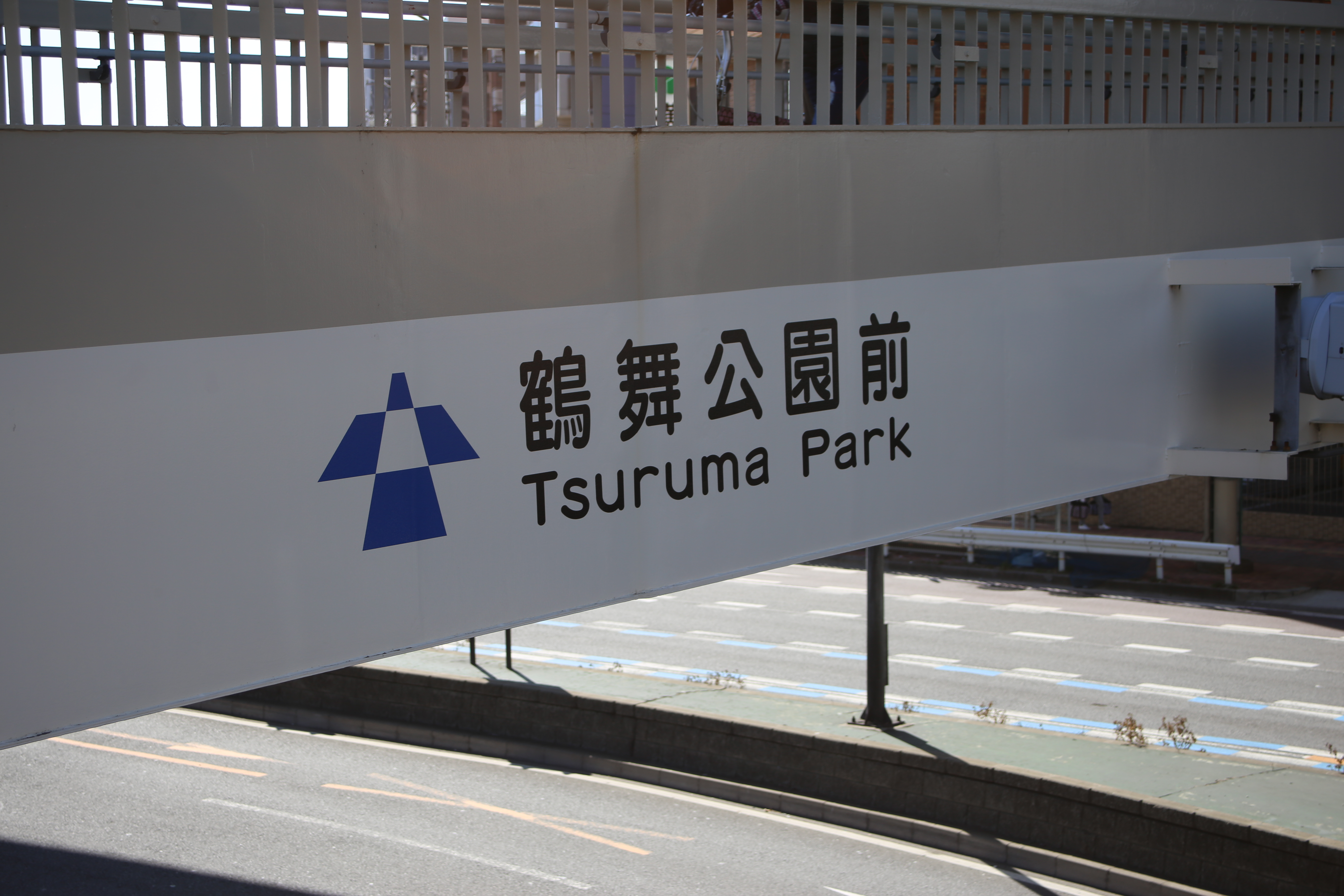 名古屋市中区千代田の「鶴舞公園前」と表記された横断歩道橋